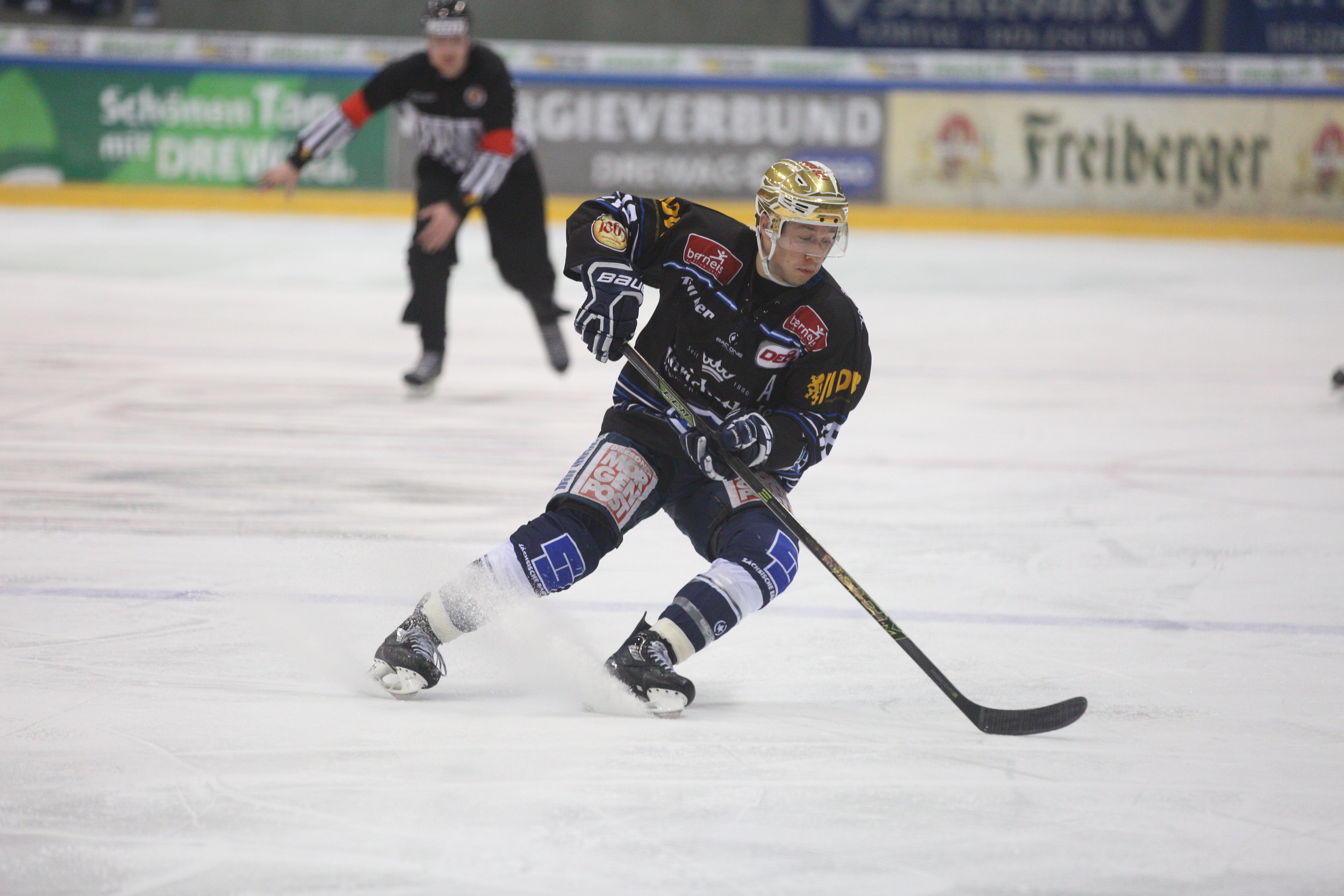 DEL 2 Play-off-Spiel Dresdner Eislöwen gegen ESV Kaufbeuren (1:4) am 14. März 2017 in der EnergieVerbund-Arena, Dresden